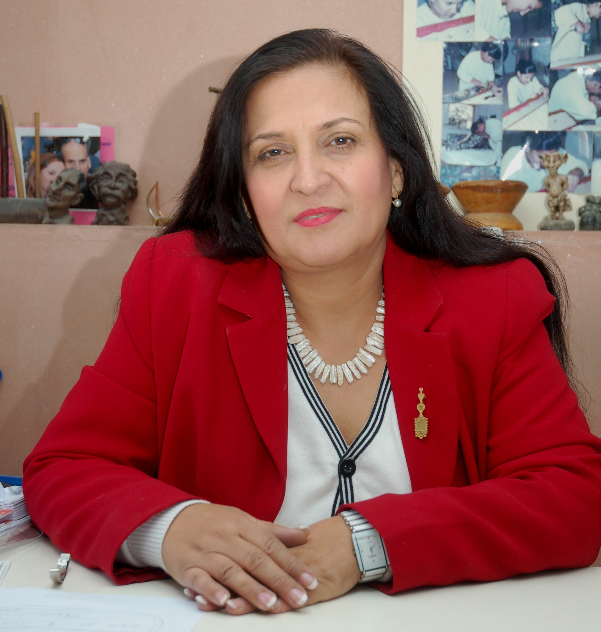 זהבה בנימין